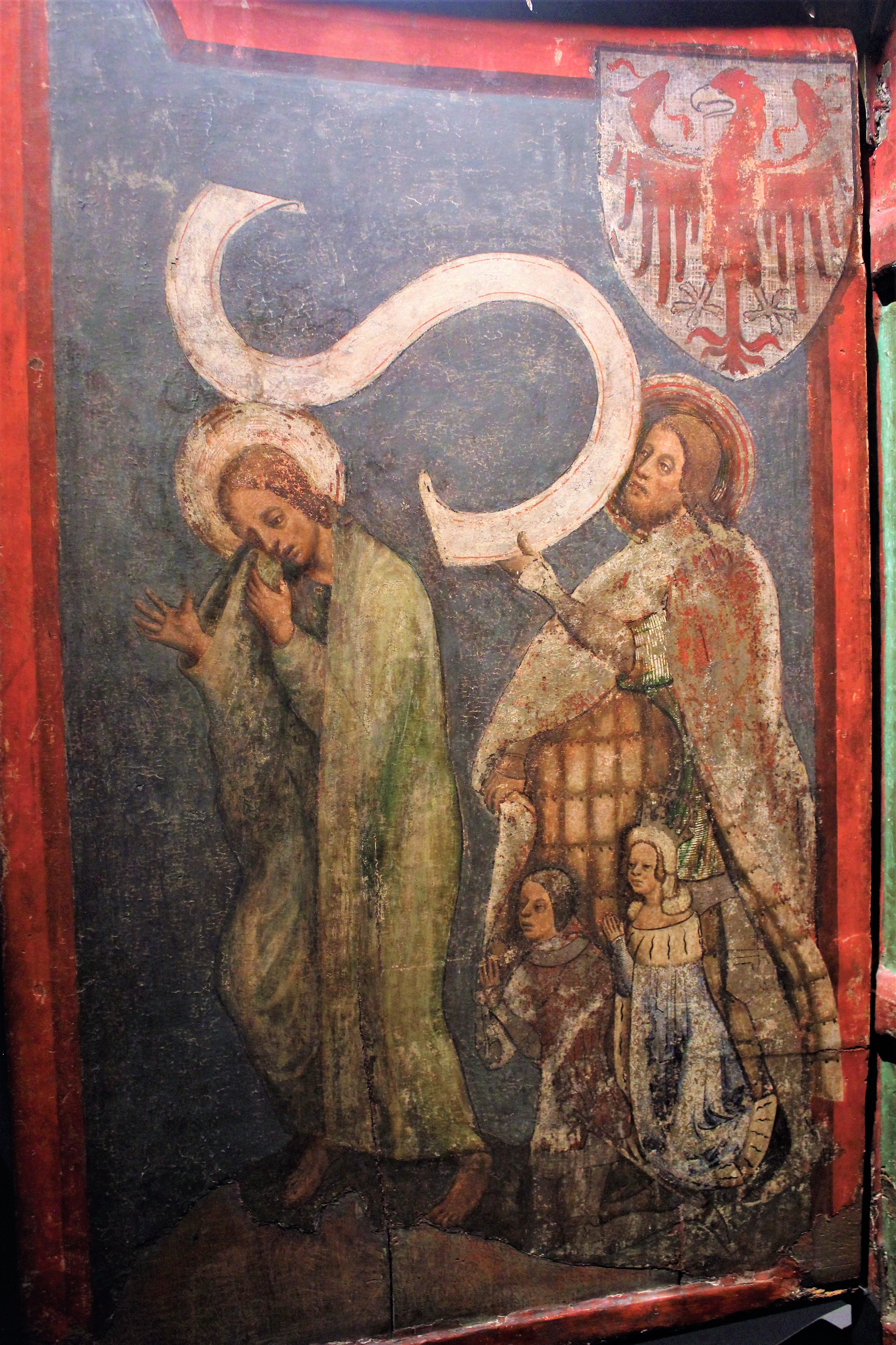 Rechte Flügelaußenseite mit dem Tiroler Adler, dem Apostel Johannes und vermutlich dem Ritterheiligen Pankraz, der ein unbeschriftetes Spruchband hält. Verkleinert knien darunter Herzog Albrecht III. von Österreich und seine Gemahlin Elisabeth von Böhmen, eines der Stifterpaare.